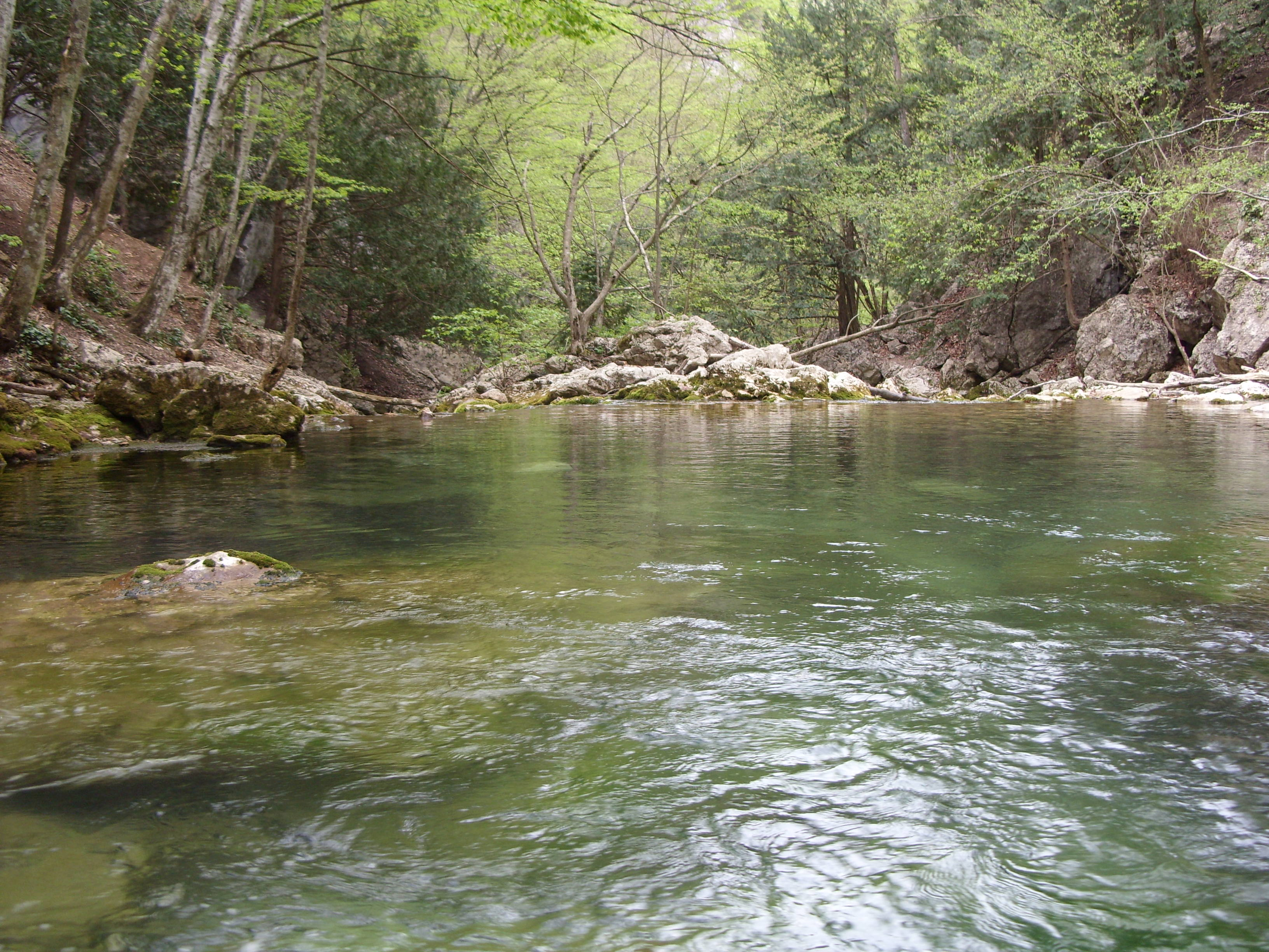 Большой каньон Крыма. Река Аузун-Узень. Голубое озеро